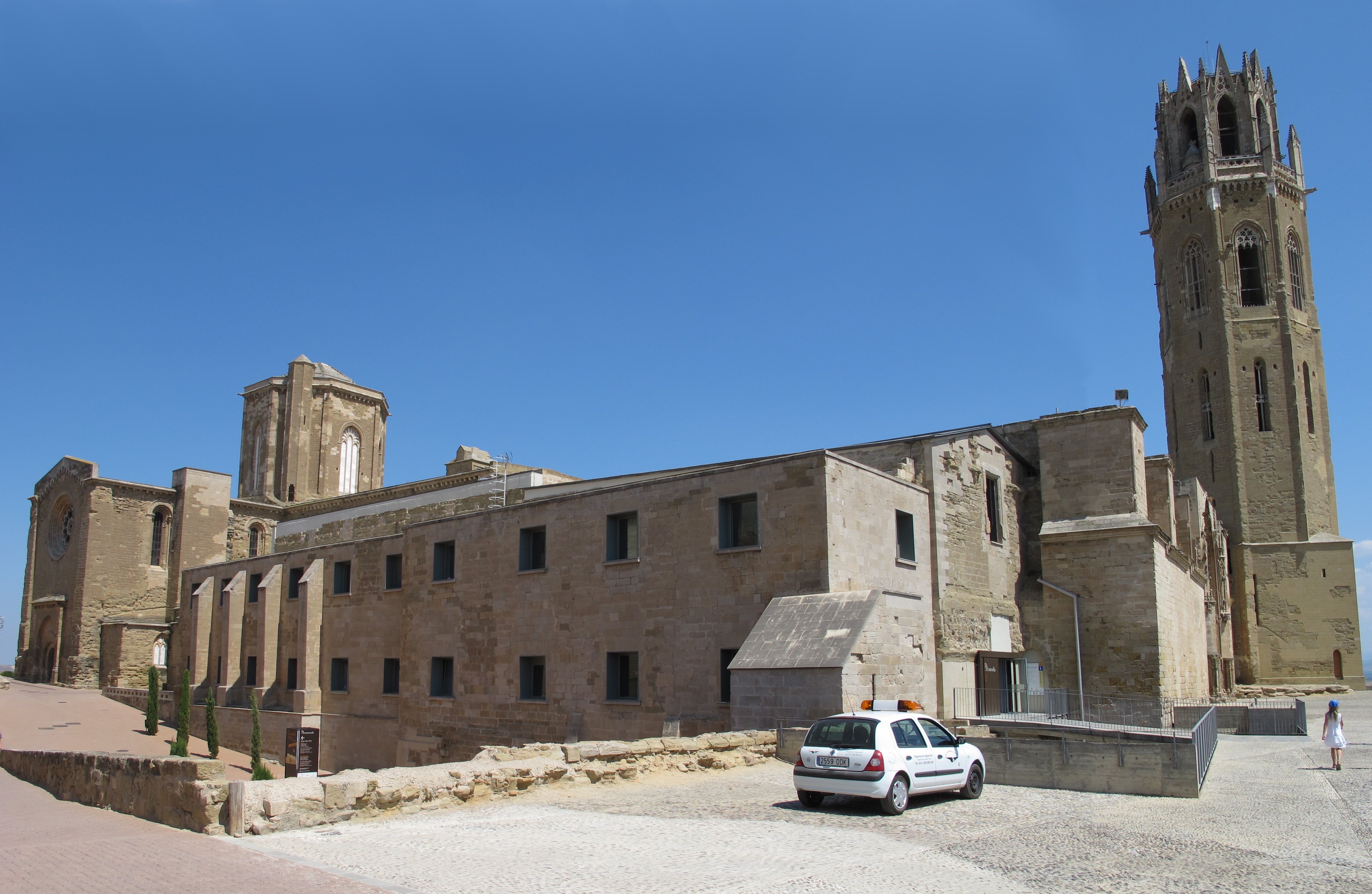 Lleida (Katalonien, Spanien), Alte Kathedrale, Nordwestseite